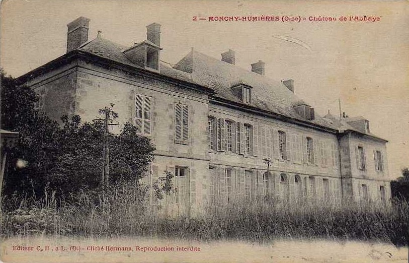 Monchy-Humières, ehemalige Zisterzienserinnenabtei, Postkarte